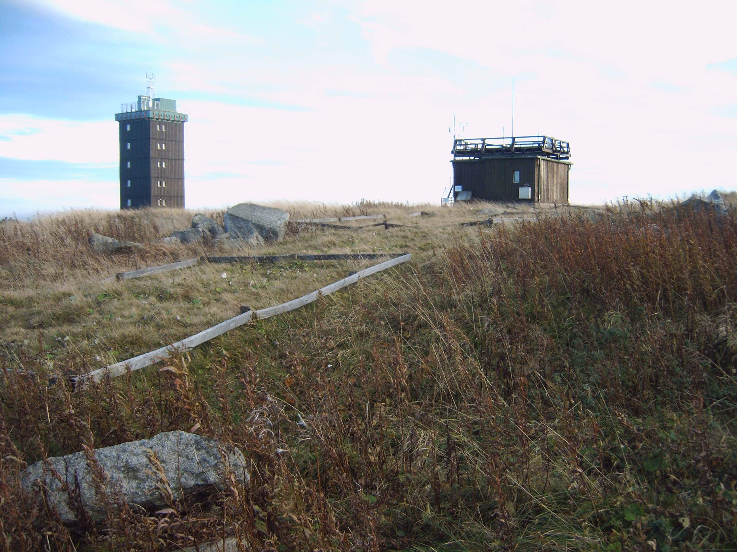 Brockengarten auf dem Brocken, Deutschland